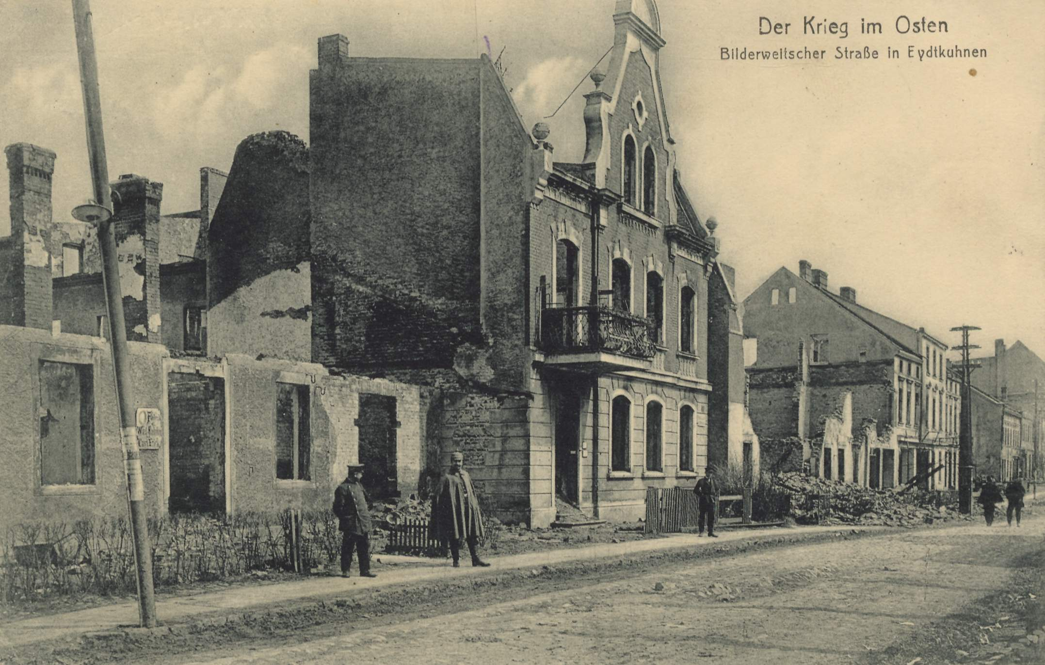 Bilderweltscher Straße